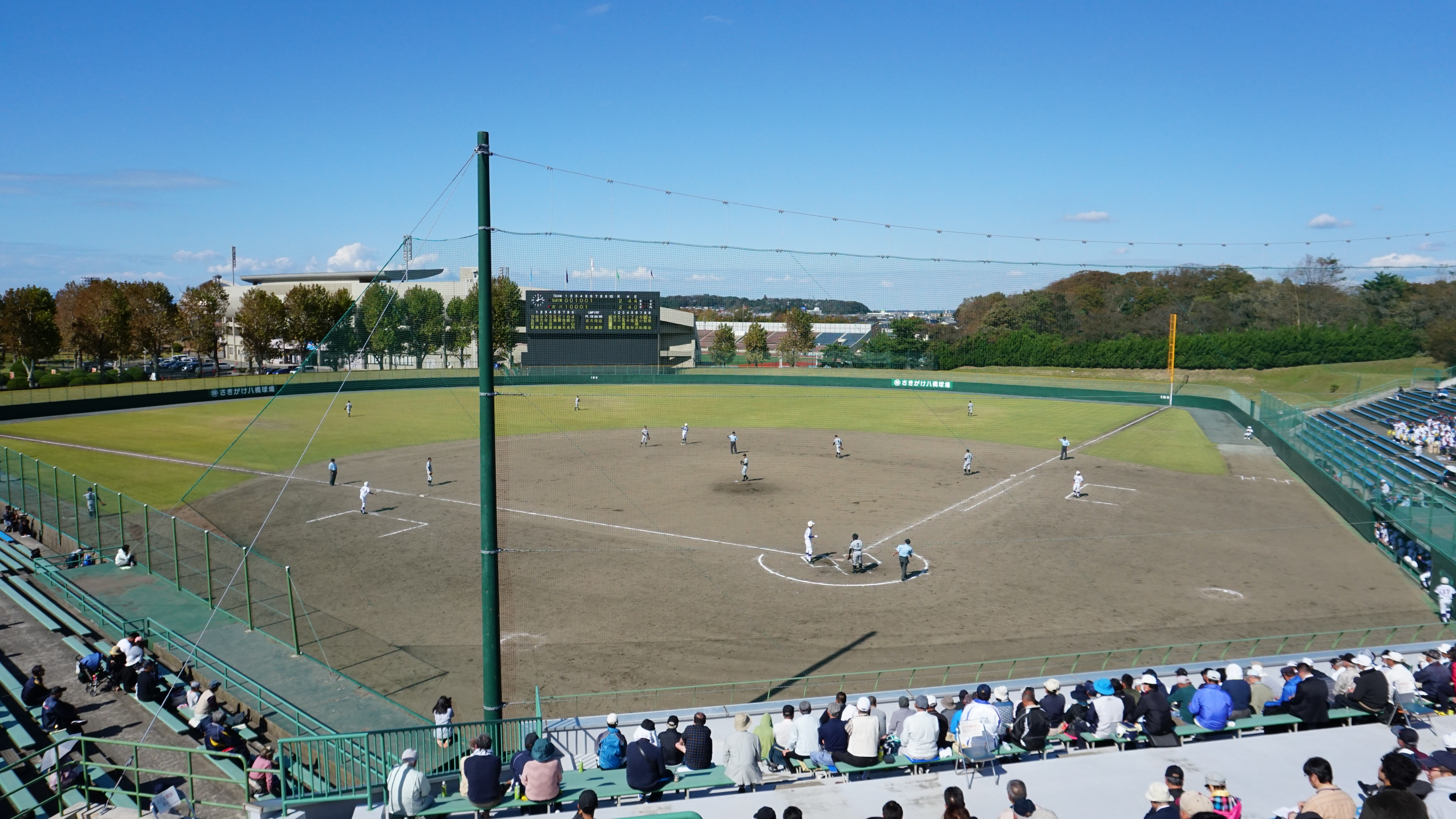 さきがけ八橋球場（秋田市八橋運動公園硬式野球場）グラウンド